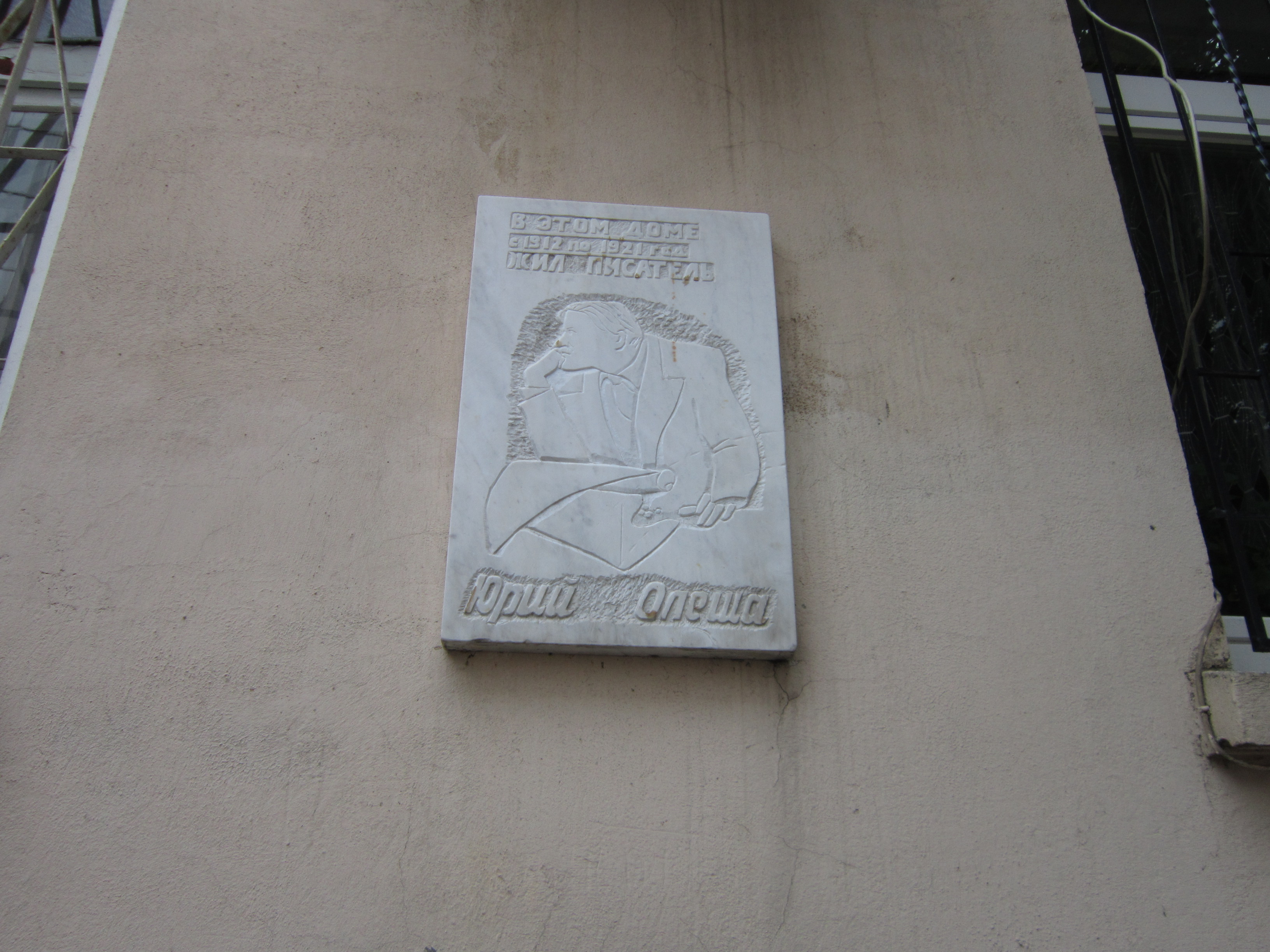 Будинок, в якому жив Ю.К. Олеша - письменник, Одеса, Юрія Олеші вул., 3